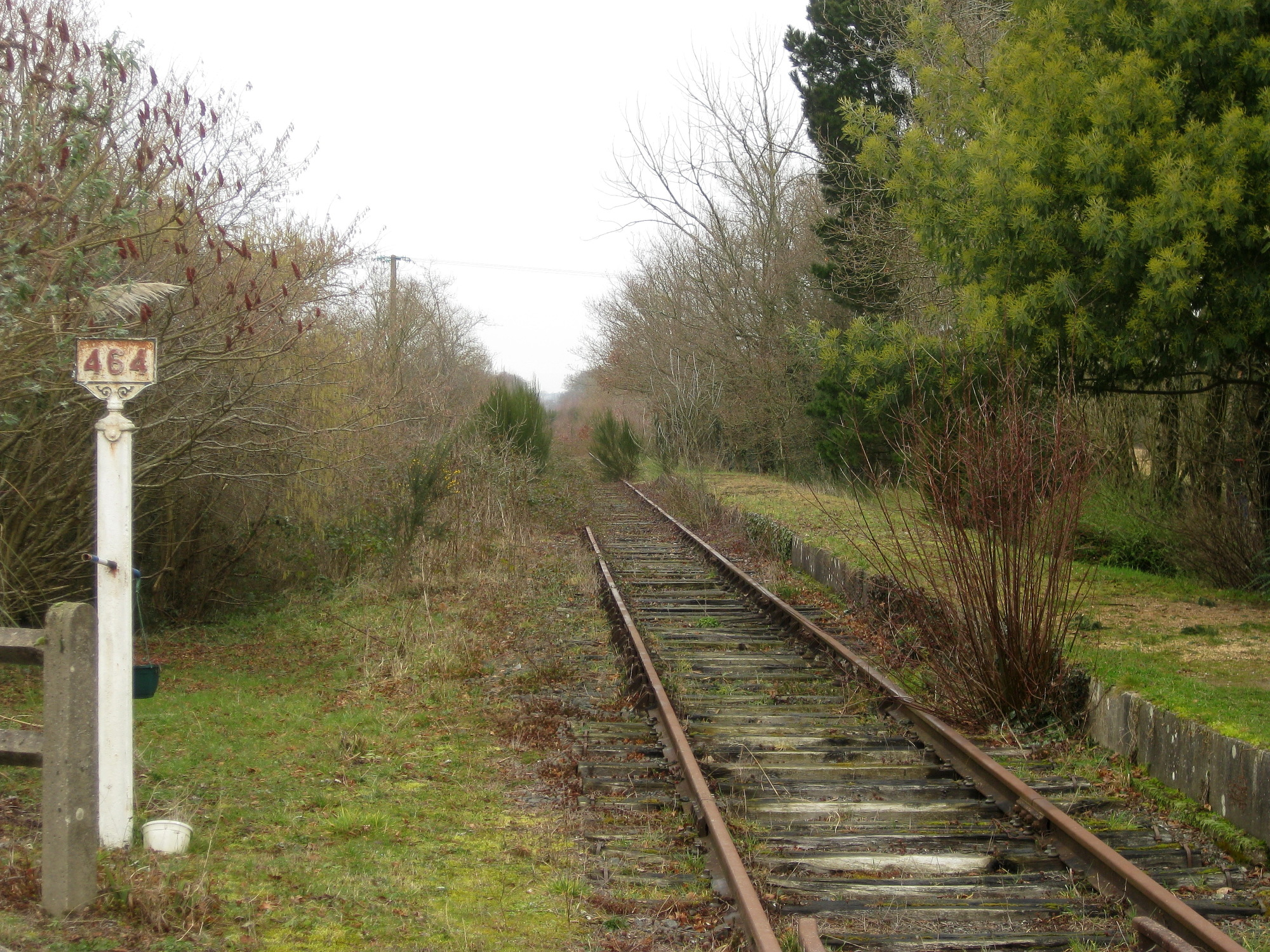 La voie unique au niveau de la Halte de Joué - Saffré sur la ligne Nantes - Châteaubriant, avant la réouverture.